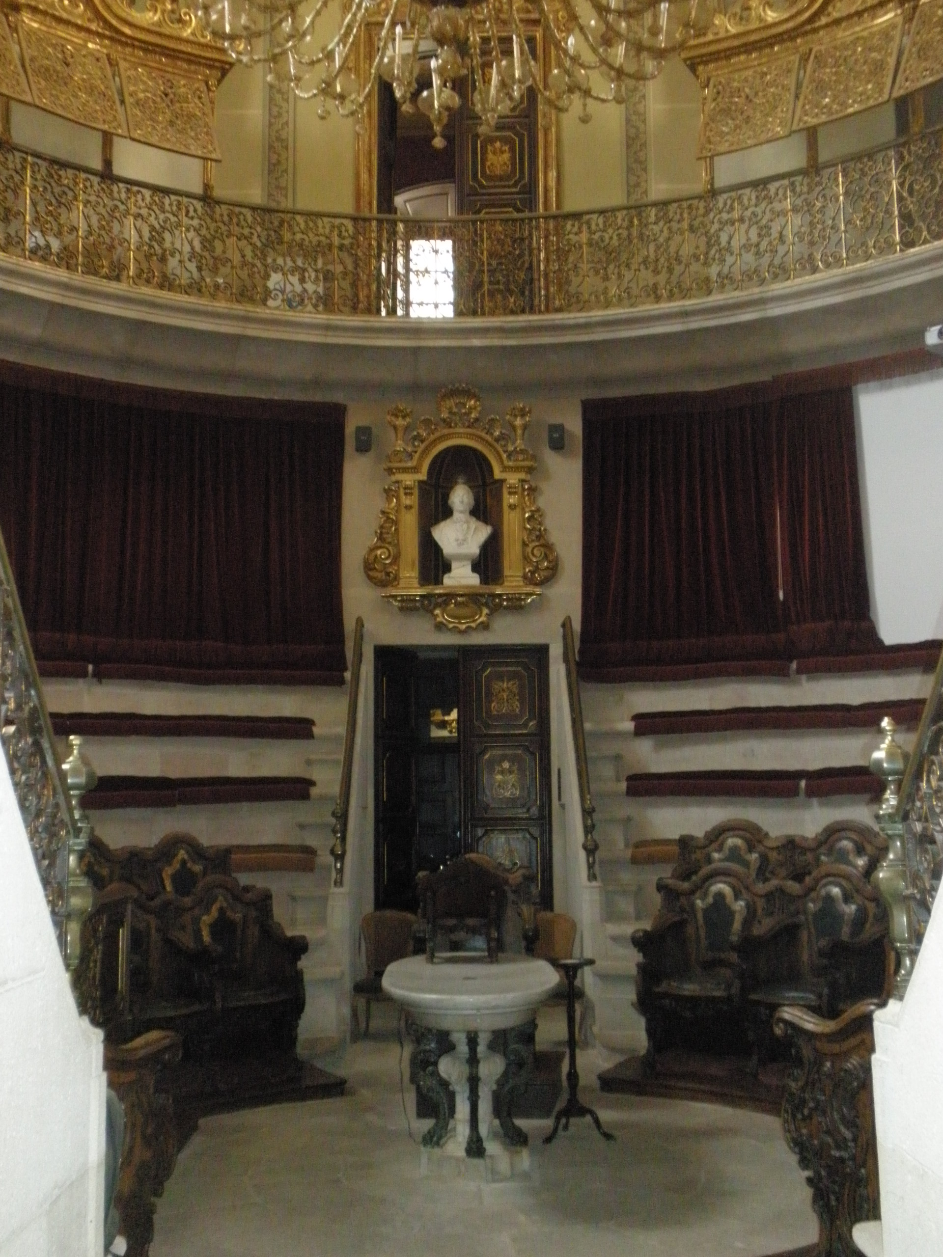 Sala Gimbernat de la Reial Acadèmia de Medicina, que és un dels amfiteatres anatòmics més importants i més ben conservats d’Europa. Noms com Servet, Mata, Gimbernat, Virgili i Cajal guarneixen la sala conjuntament amb uns elaborats vitralls, i al mig del saló hi ha la taula de marbre de les disseccions, una de les poques que es conserven.